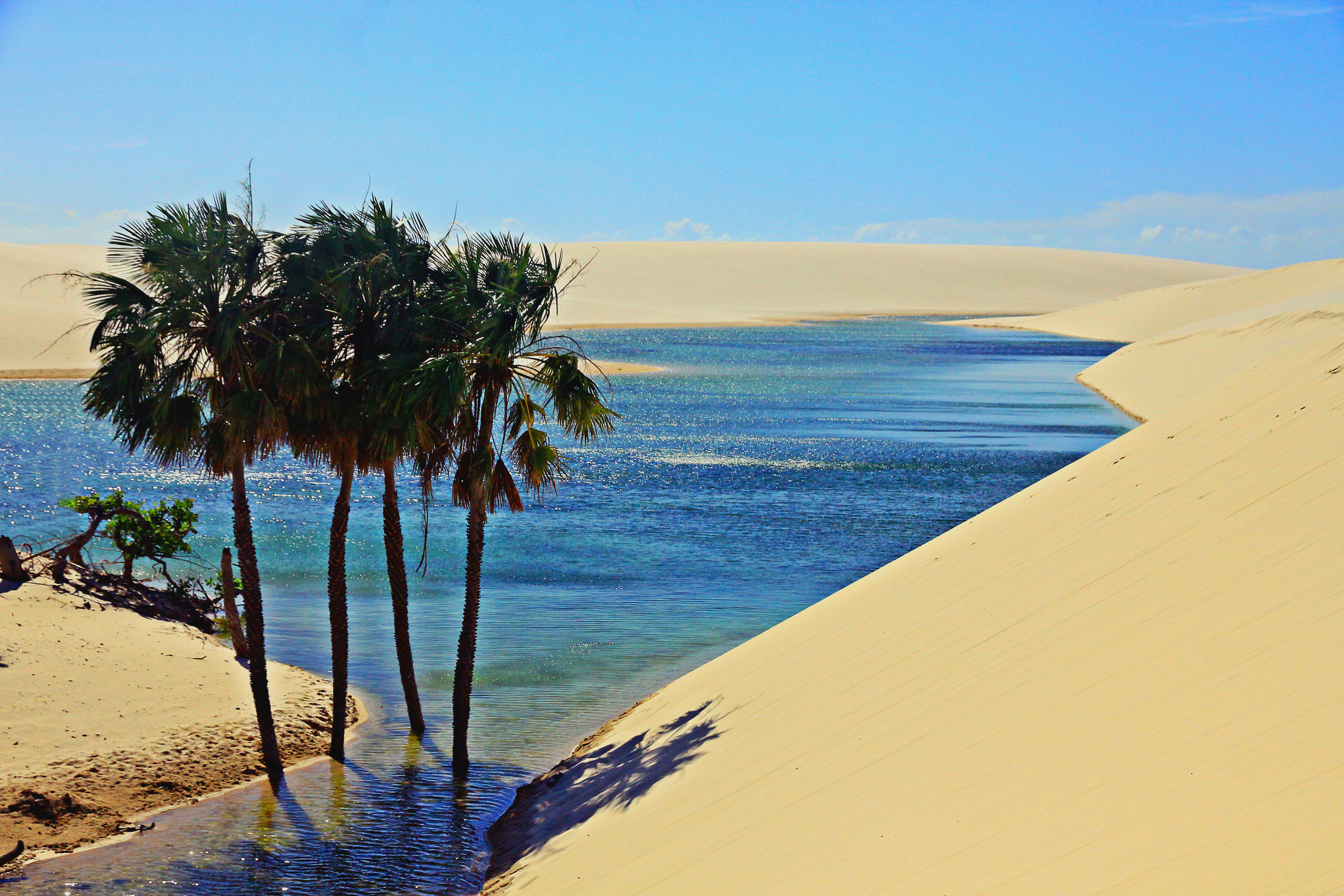 A Lagoa da América fica dentro do Parque Nacional dos Lençóis Maranhenses e é uma das atrações turísticas do município de Santo Amaro do Maranhão.